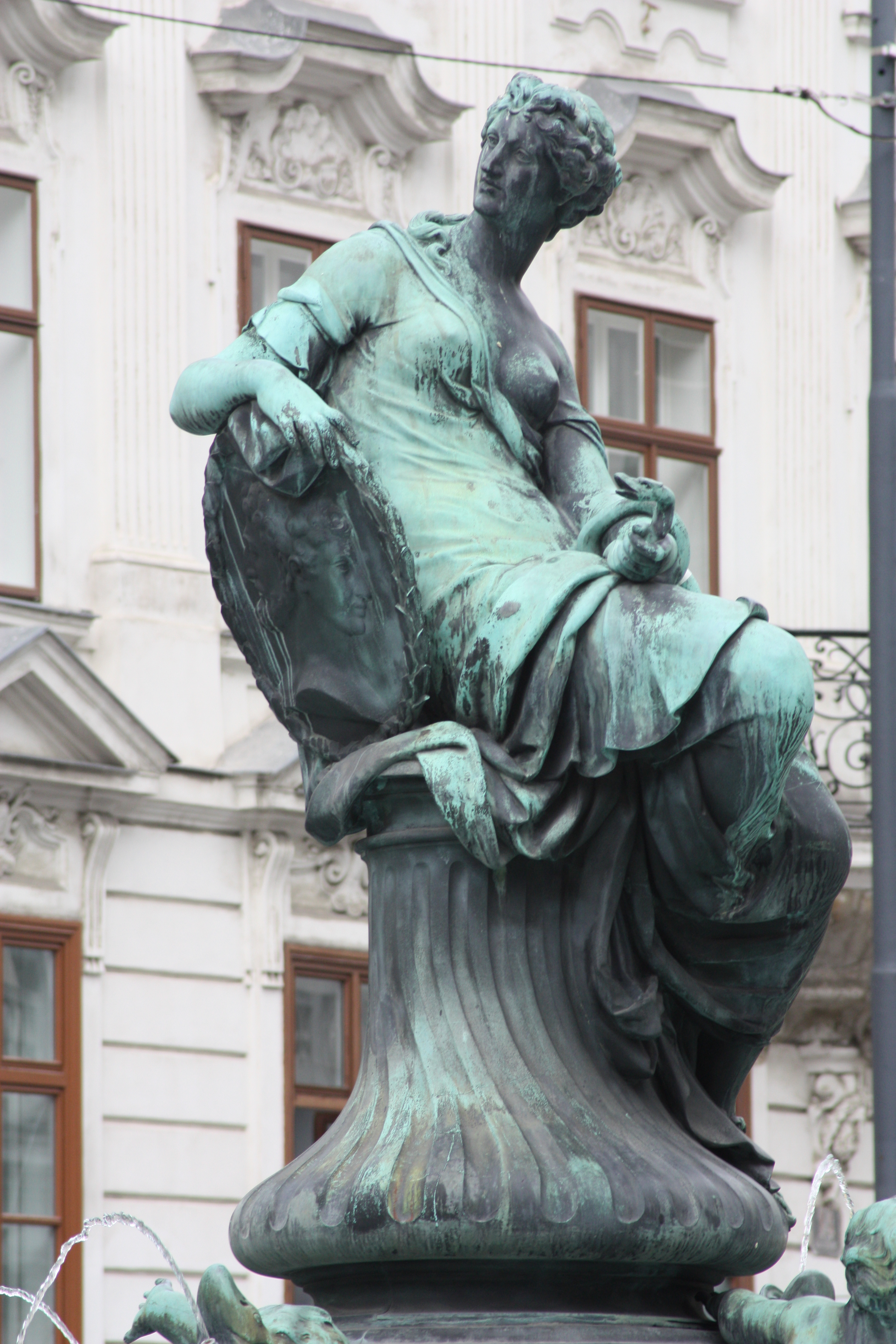 Donnerbrunnen, Wien, Vienna